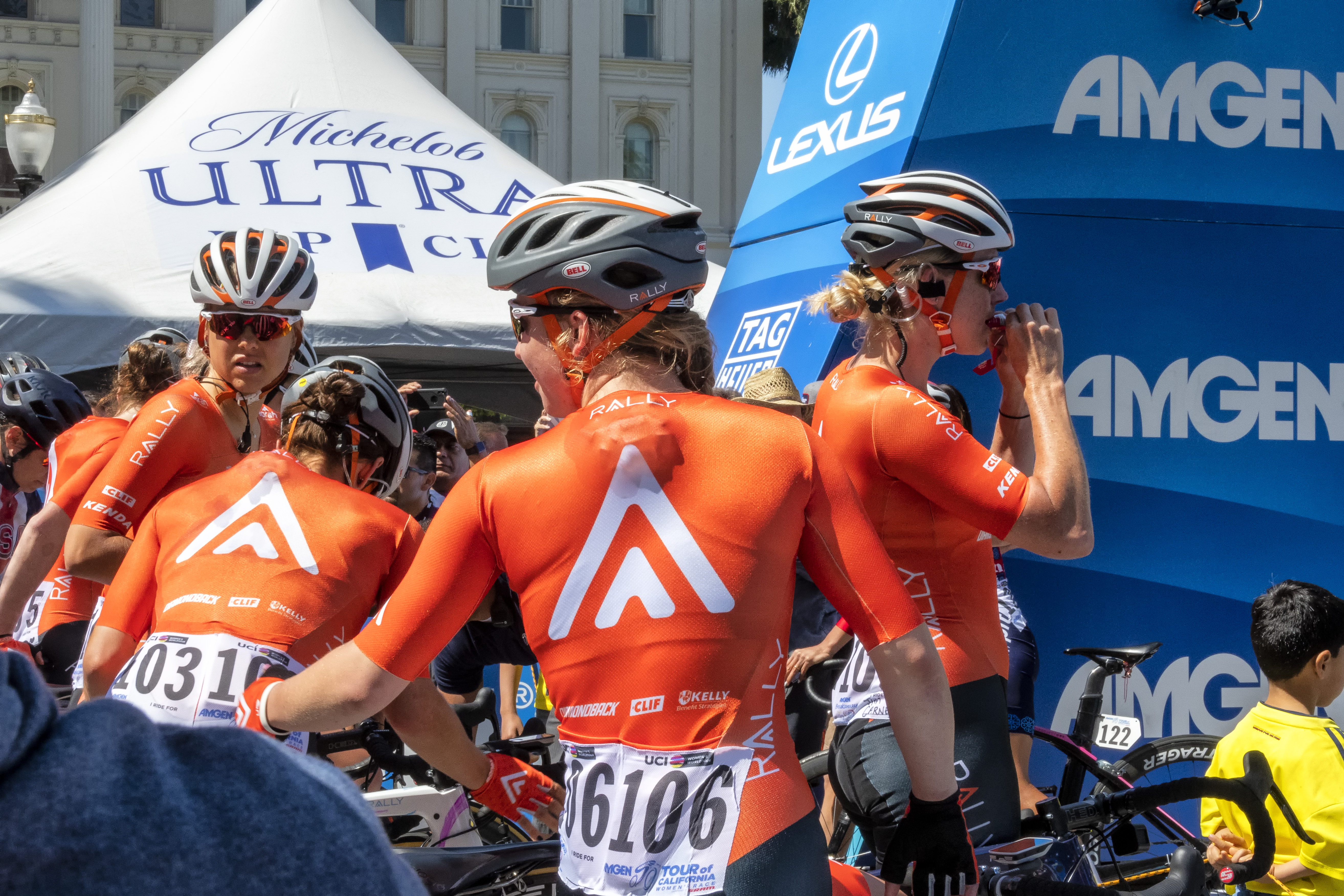 Amgen Women's Tour 2018